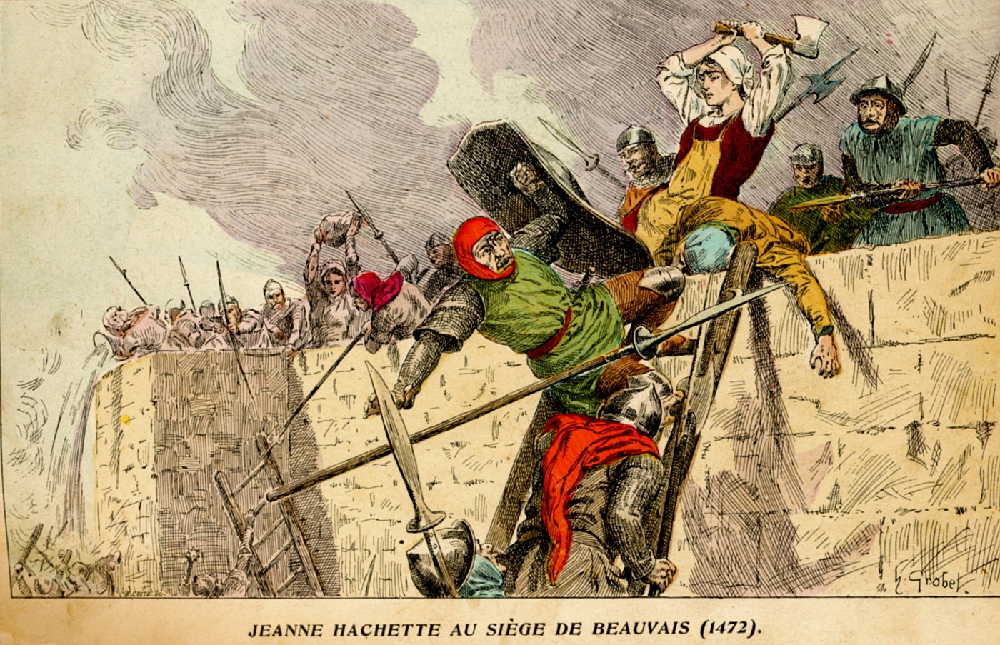 Jeanne Hachette au siège de Beauvais (1472). Lithographie en couleurs par E. Crété d'après une illustration de H. Grobet, Histoire de France, Paris, Émile Guérin, 1902.